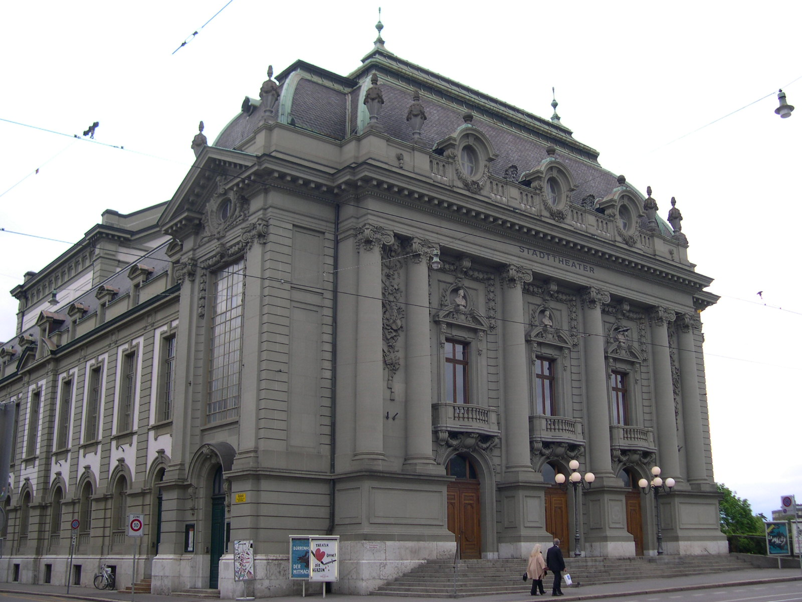 Bern, Switzerland: Stadttheater